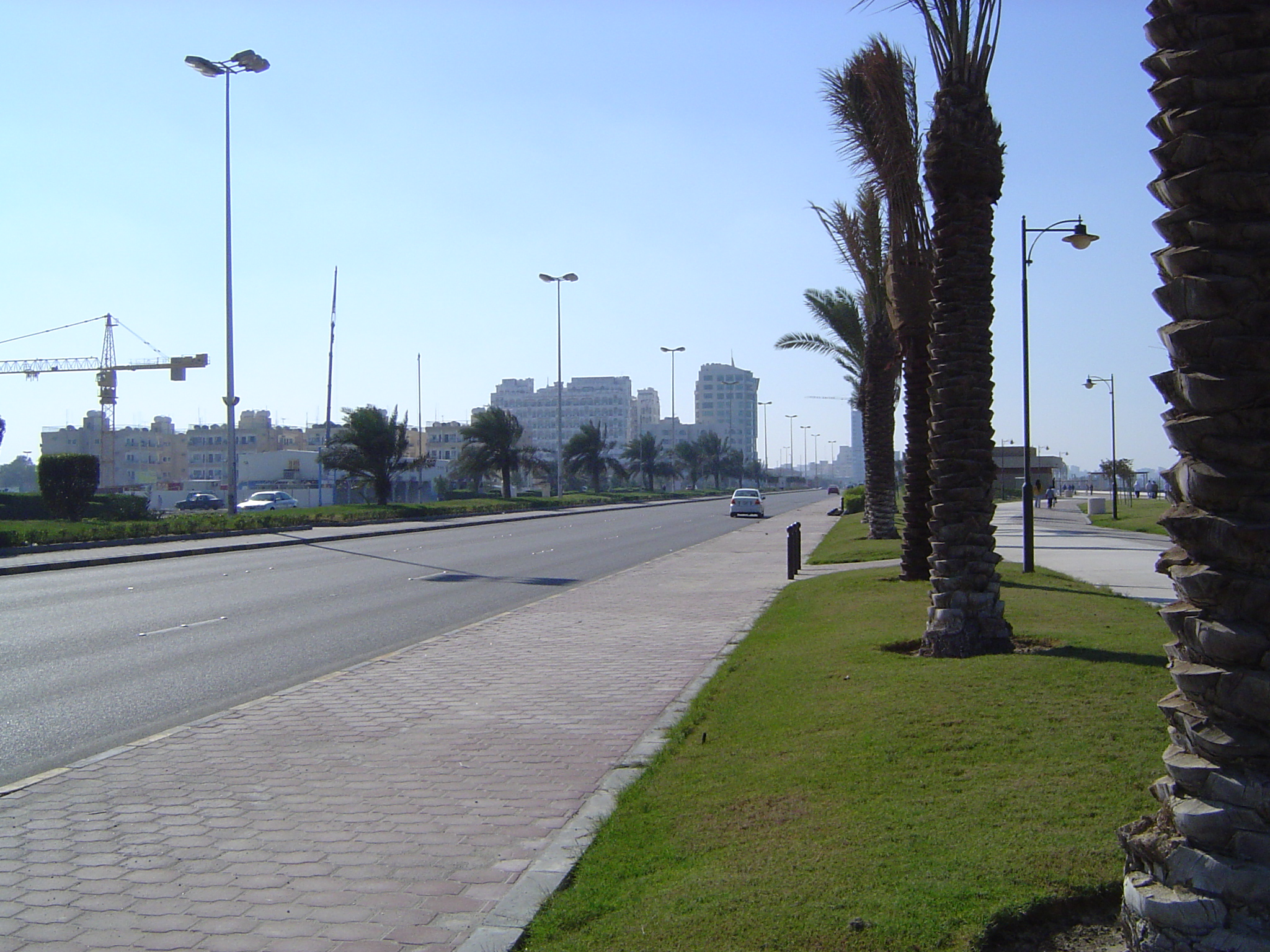 Kuwait